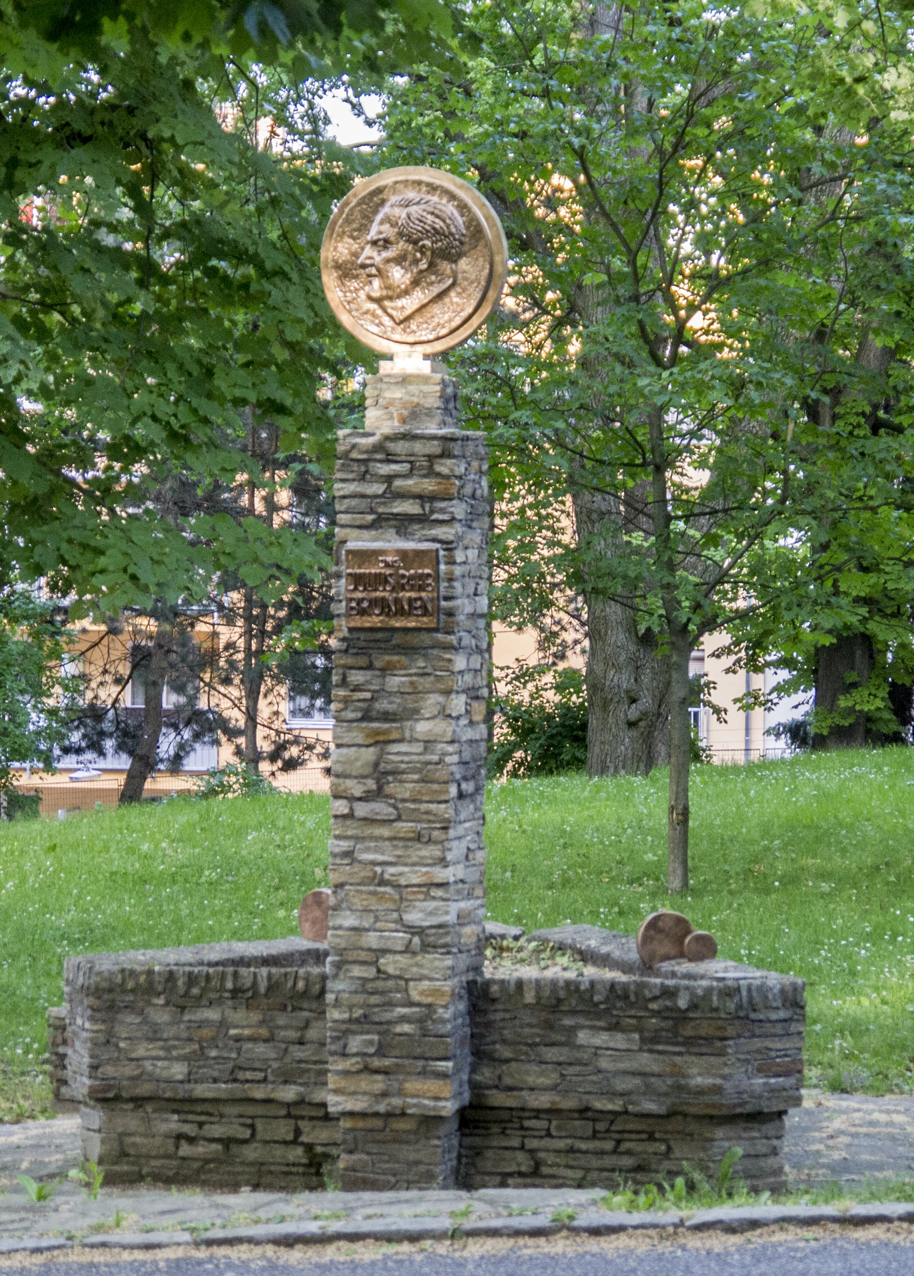 Schwenkgasse 14 Julius Raab Brunnen. Verm. zu Julius-Raab-Siedlung/Julius-Raab-Hof gehörend (1956, Josef Vytiska)